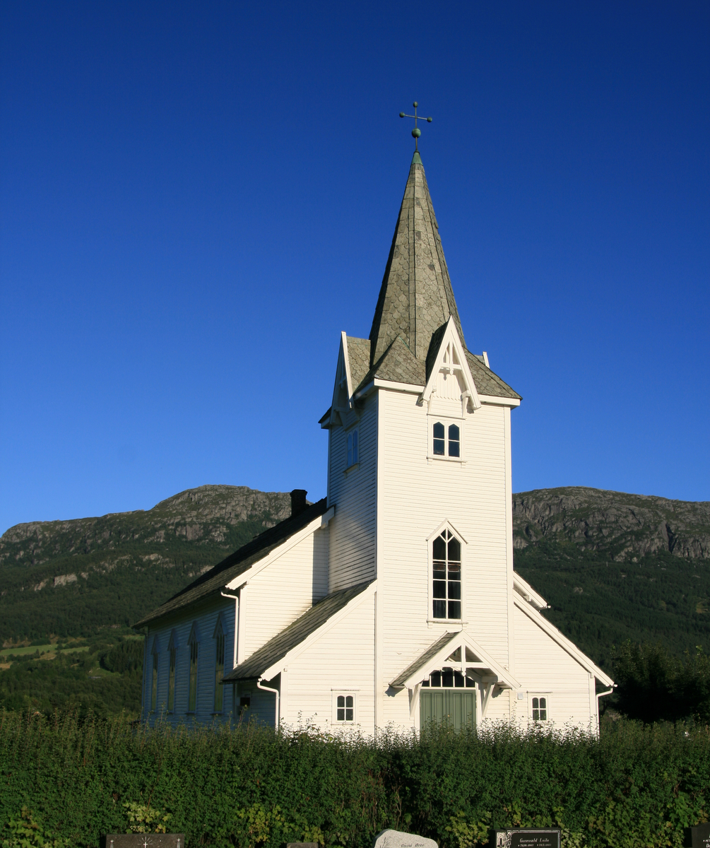 Sandeid kirke